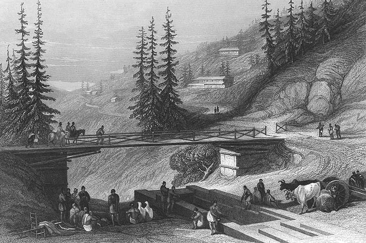 Shimla, 1850s.